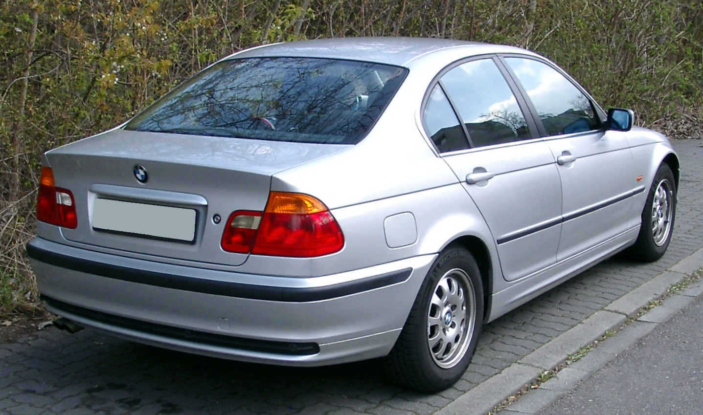 BMW E46